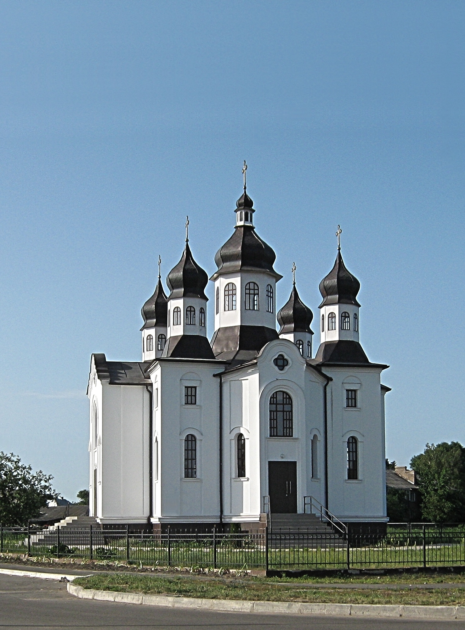 сповiдальня Iвана Мазепи